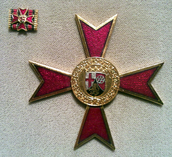 Verdienstorden des Landes Rheinland-Pfalz: Steckkreuz und Miniatur an der Nadel.